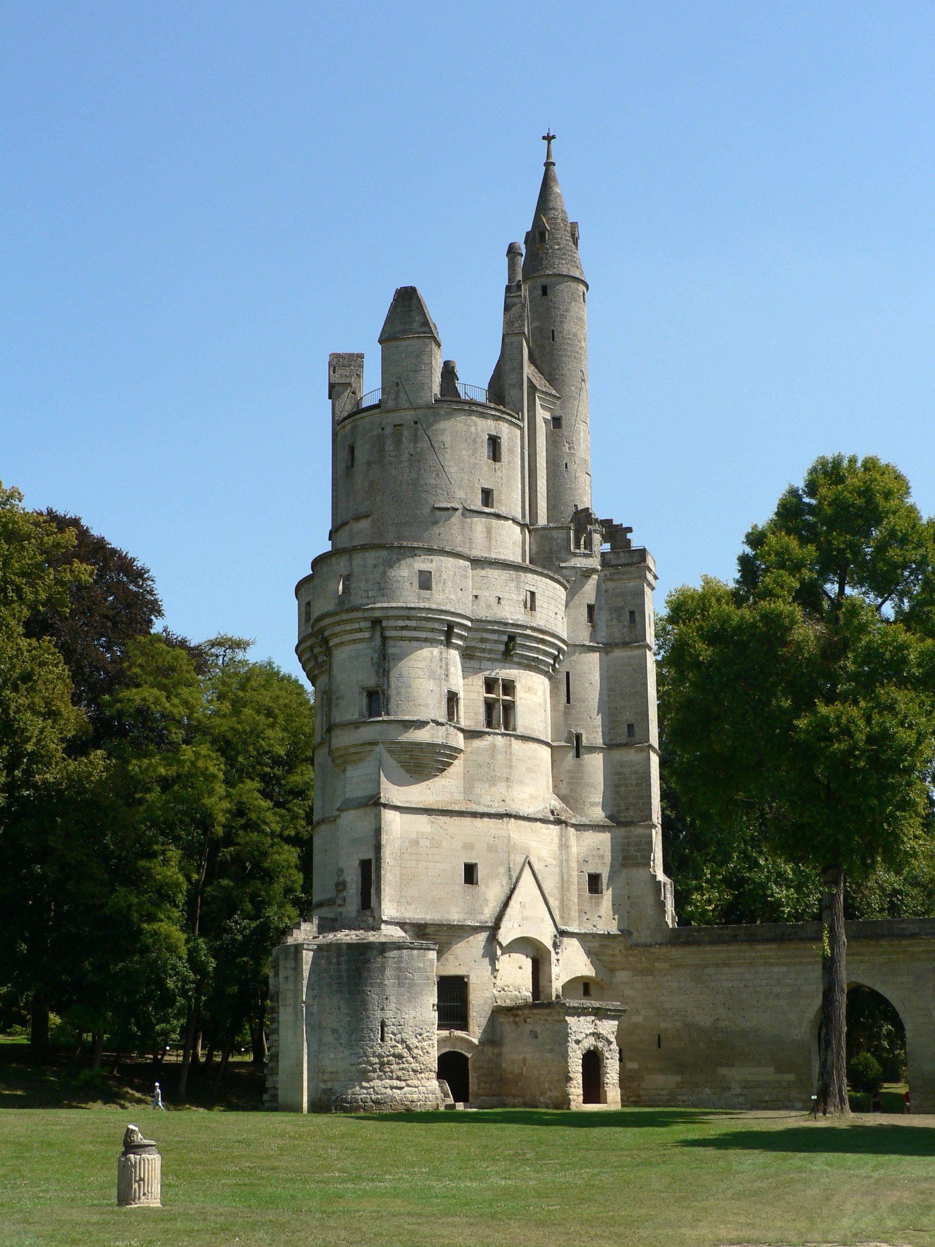 Donjon de Septmonts, Aisne, France .